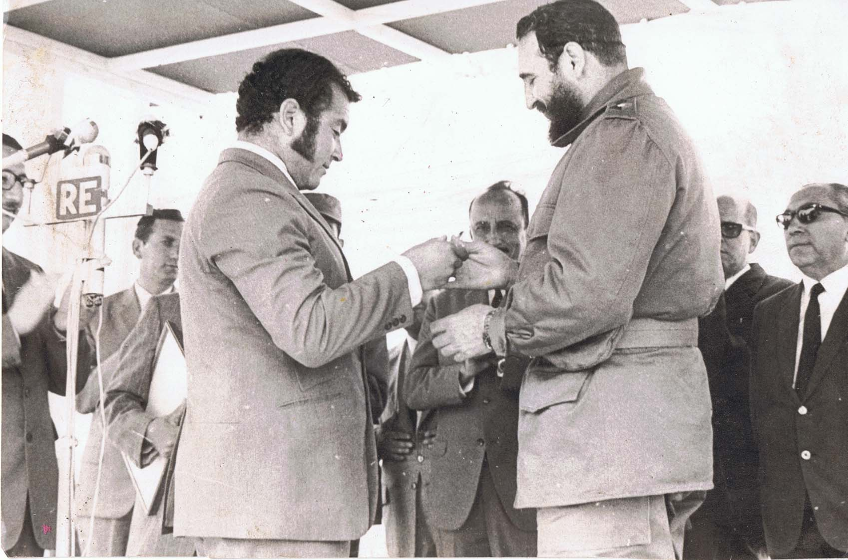 Alcalde German Mirić junto al Jefe de la Revolución Cubana Fidel Castro Rúz en su visita a Chile en 1971